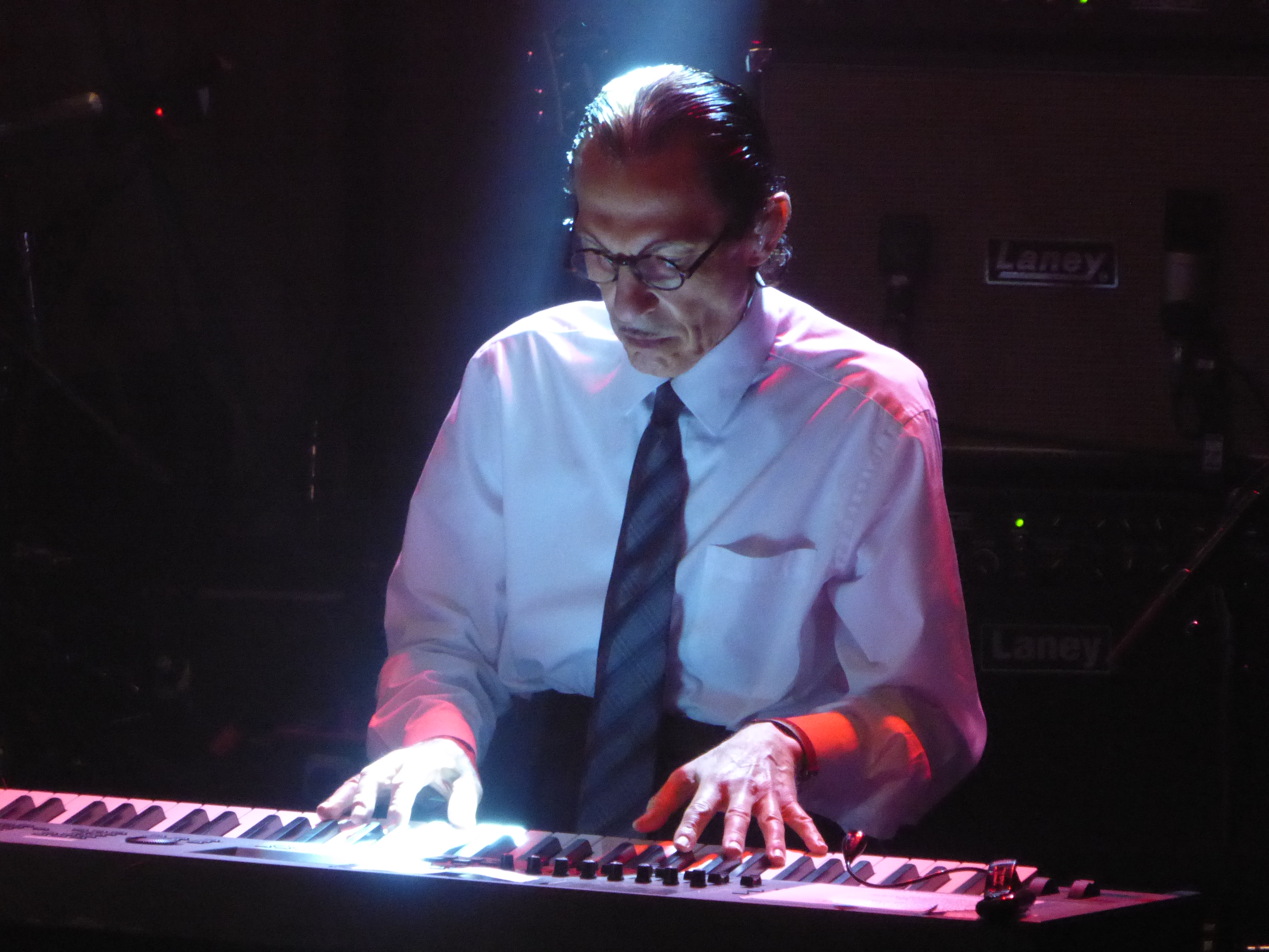 Ron Mael of FFS (Franz Ferdinand & Sparks) @ Albert Hall, Manchester 25/8/2015